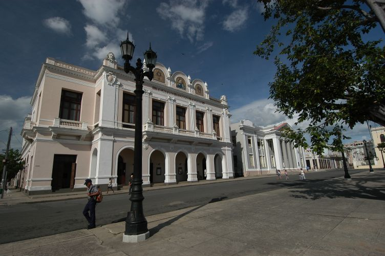 Cuba, september 2005, info in de Metadata